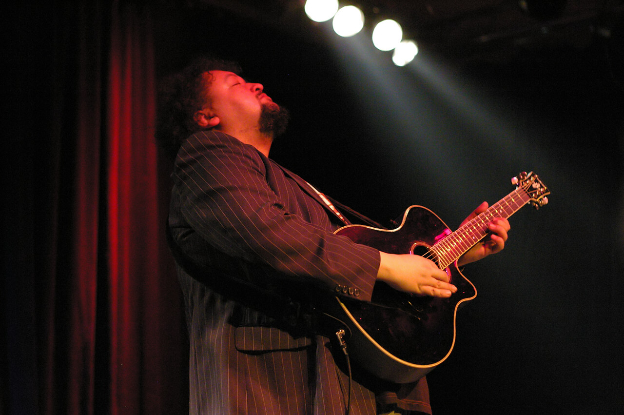 Mark Booga Fowell, Ezio (Band), Auftritt als Duo in der Lindenbrauerei, Unna, 23.03.2007